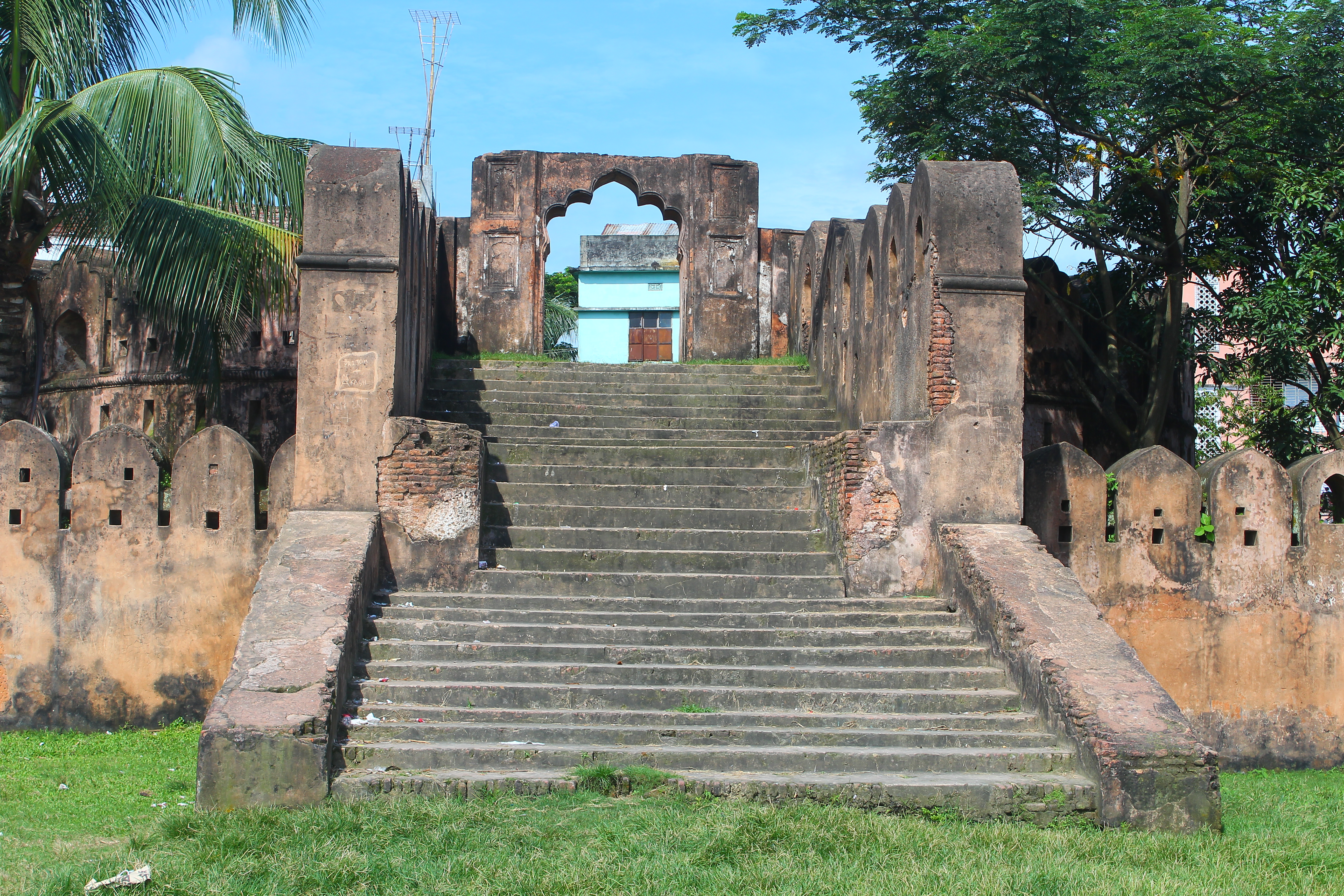 সোনাকান্দা দুর্গ